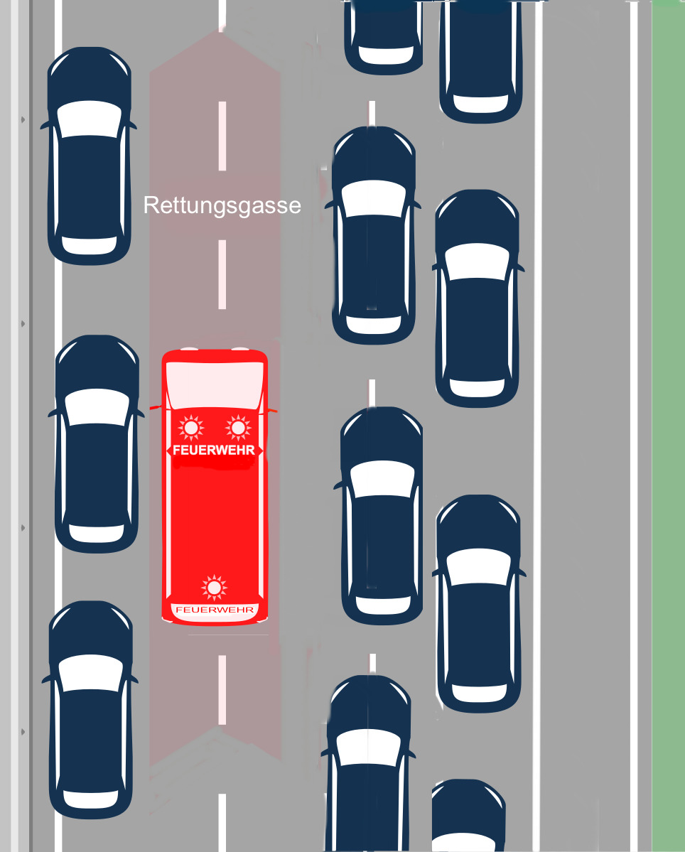 Rettungsgasse in Deutschland 3 Spuren